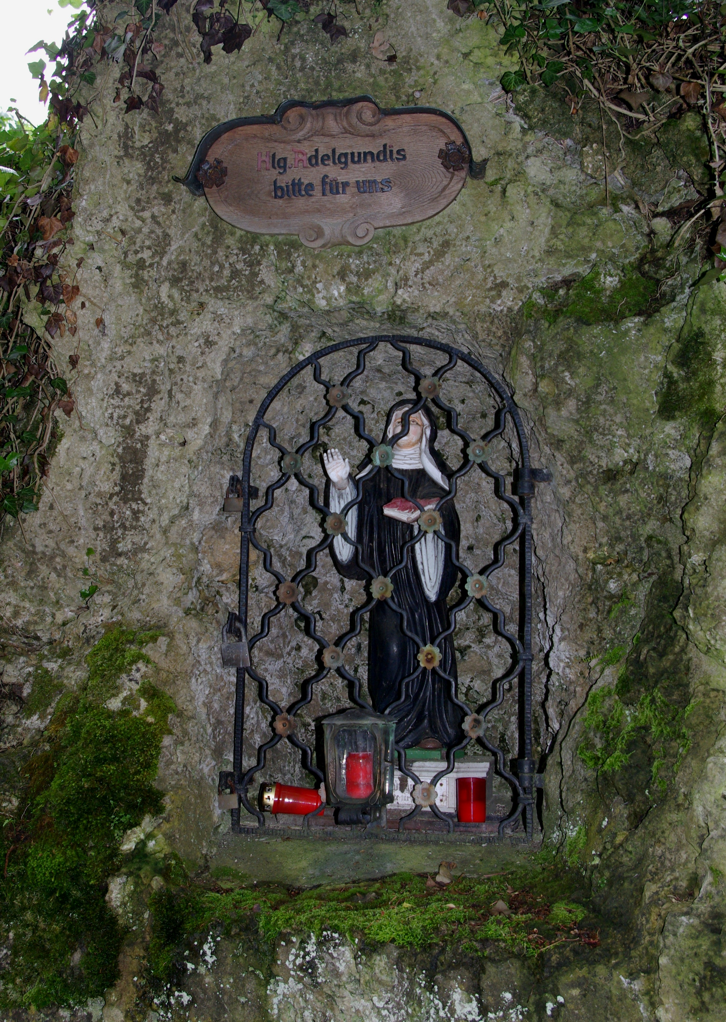 Heiligenhäuschen der Adelgundis am Hang des Staffelbergs